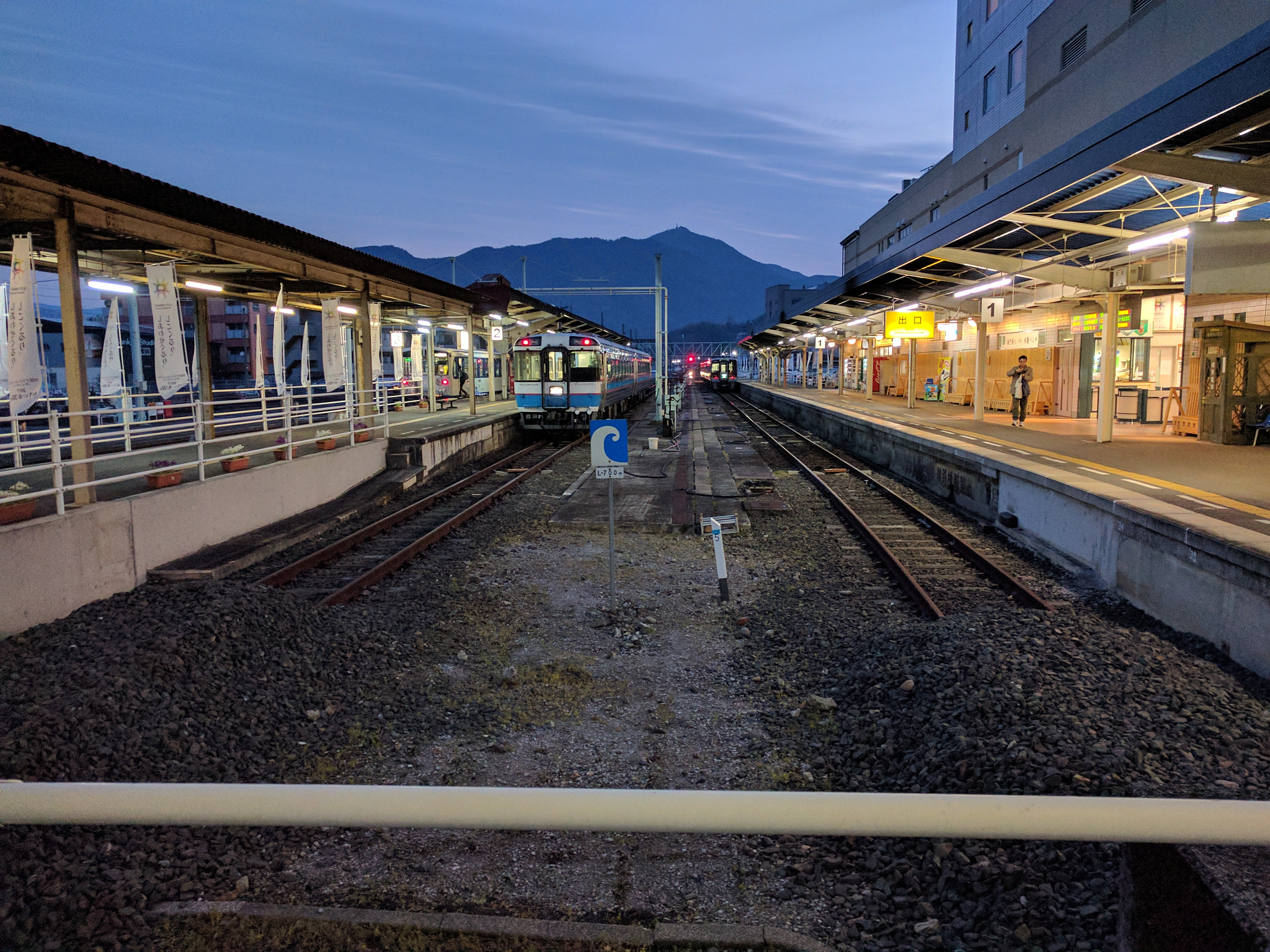 JR宇和島駅